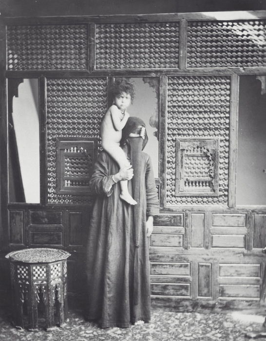 De gevel op de achtergrond is voorzien van mashrabiyya, houten traliewerk.